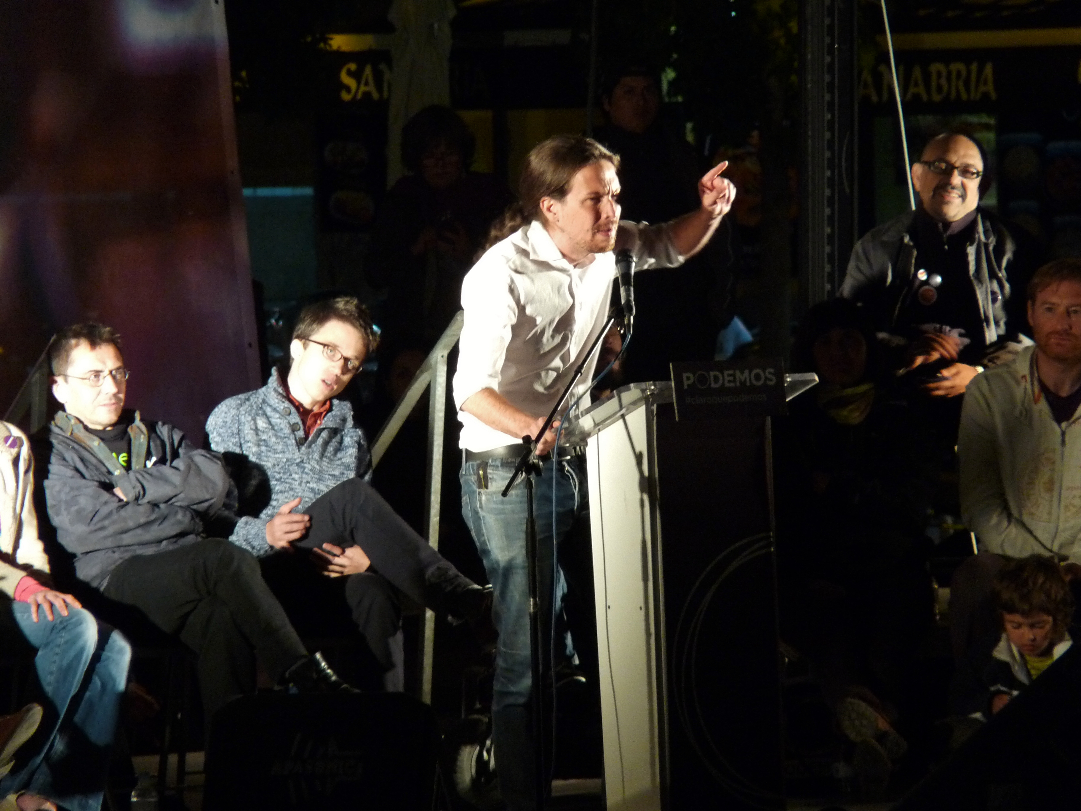 Pablo Iglesias en el mitín de fin de campaña de las elecciones europeas de 2014 celebrado el 23 de mayo en Madrid.